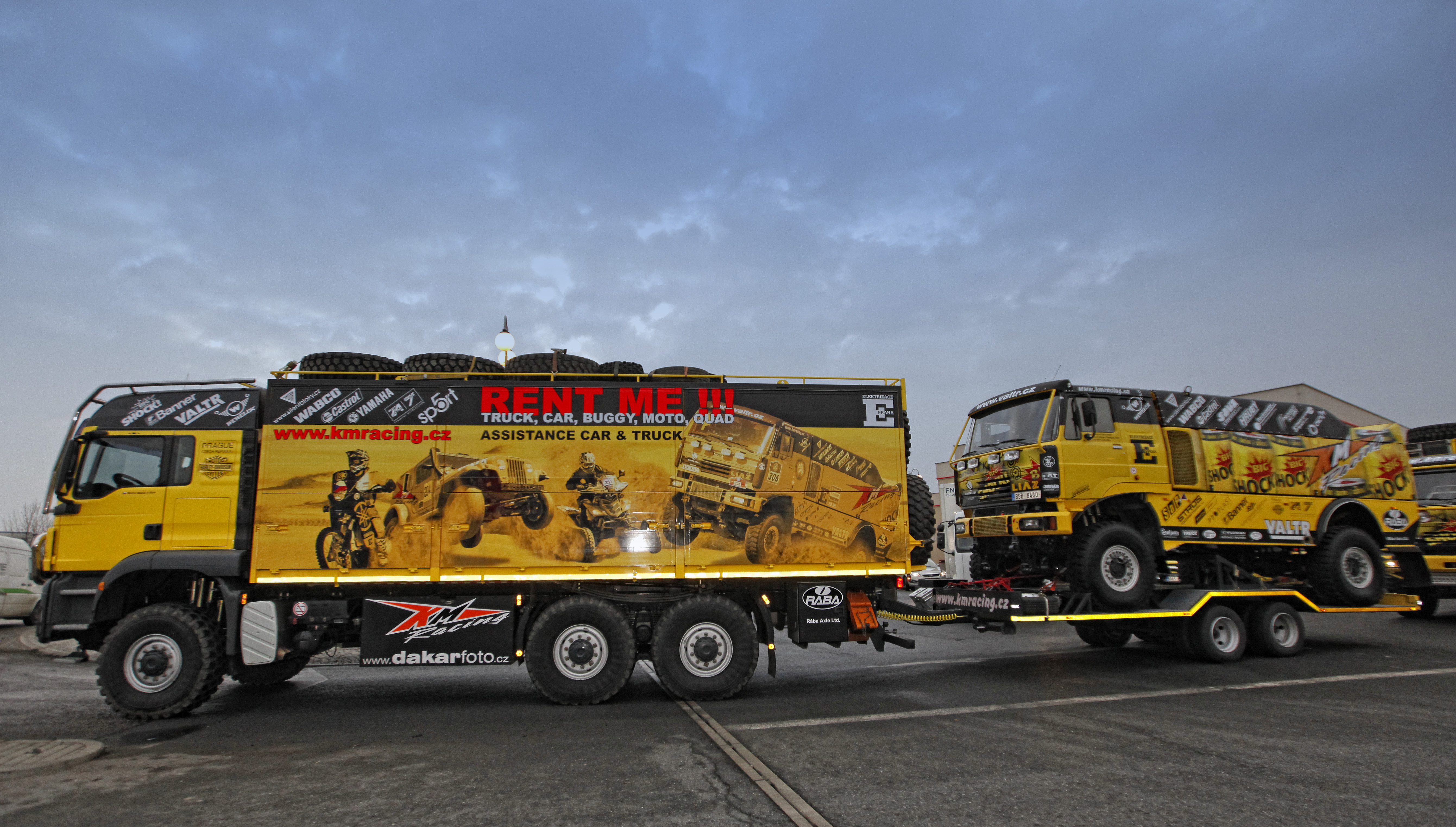 MAN 6x6 asistence